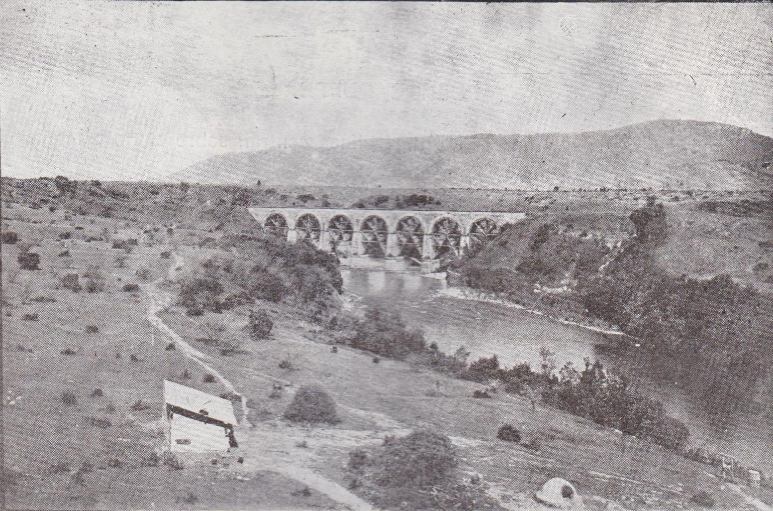 Antiguo puente sobre el río Claro. Circa 1929. Puente ubicado en la línea Santiago-Puerto Montt, entre las estaciones Yumbel y Río Claro. Imagen obtenida a partir del libro (in Spanish) (1929) Ferrocarriles del Estado de Chile (3rd ed.), Santiago: Impr. Harris y Pascual